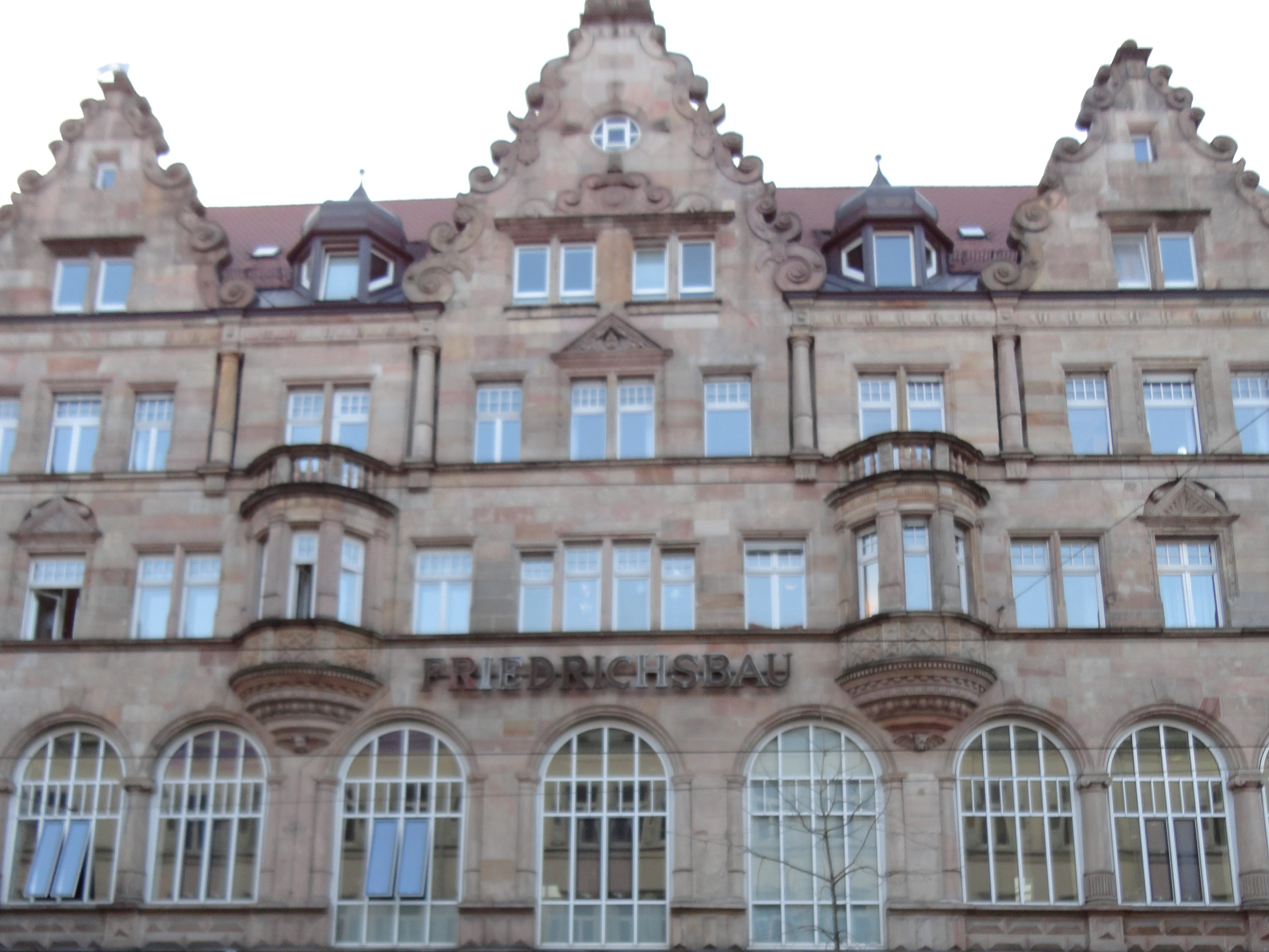 Der Friedrichsbau in Freiburg im Breisgau, der um 1900 das "Wiener Kaffee" beherbergte, etwa 1910 innen umgebaut und danach bis heute etliche Kinos enthielt. Spätestens ab 1902 spielte der "Freiburger Schach-Club" im "Wiener Kaffee".